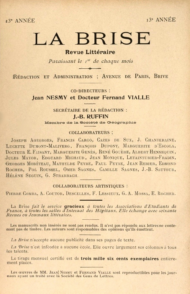 La Brise : littérature, art, histoire / directeur Fernand Vialle, revue paraissant à Brive. Numéro de janvier 1913